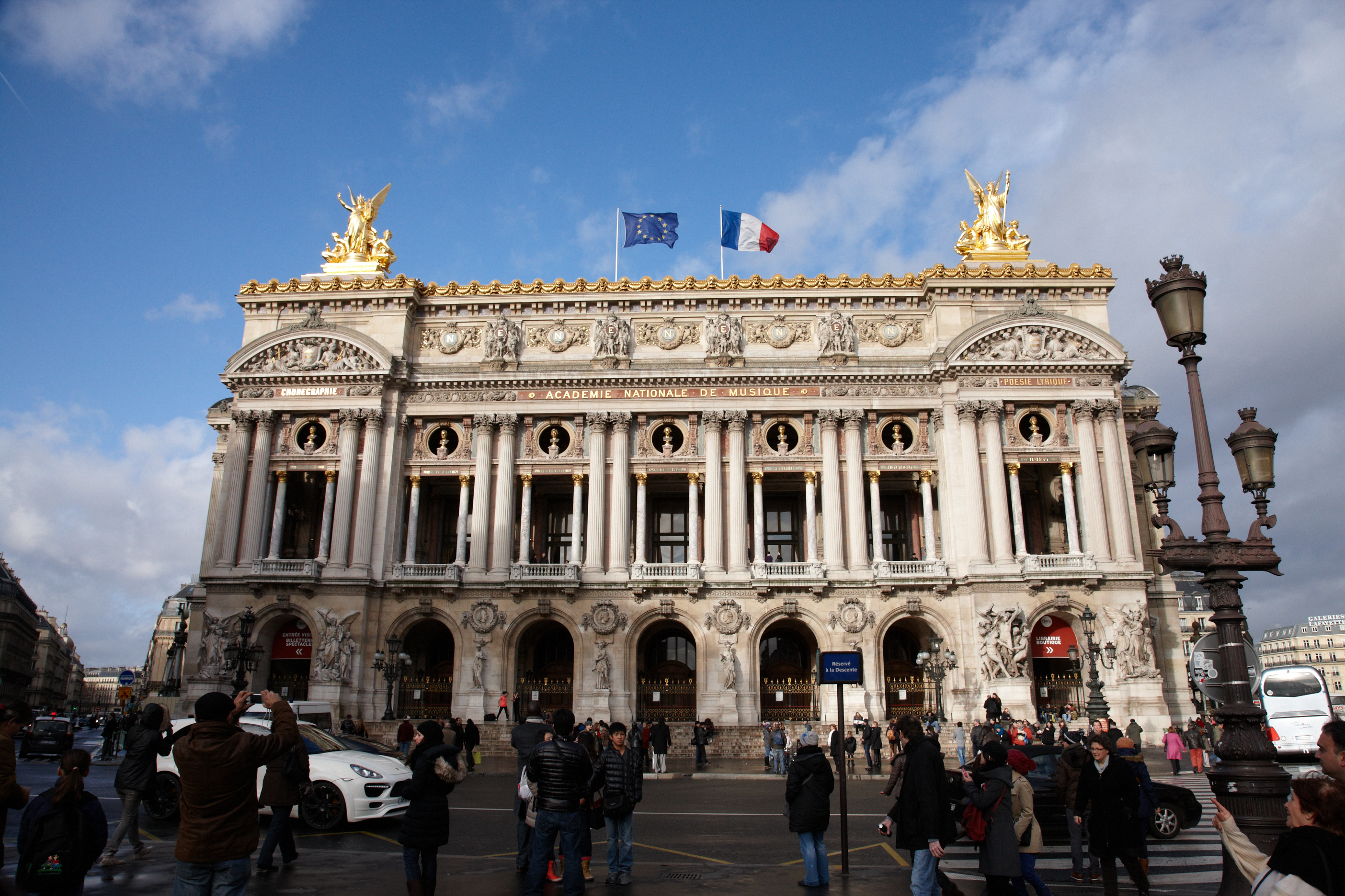 Pari Opera outside